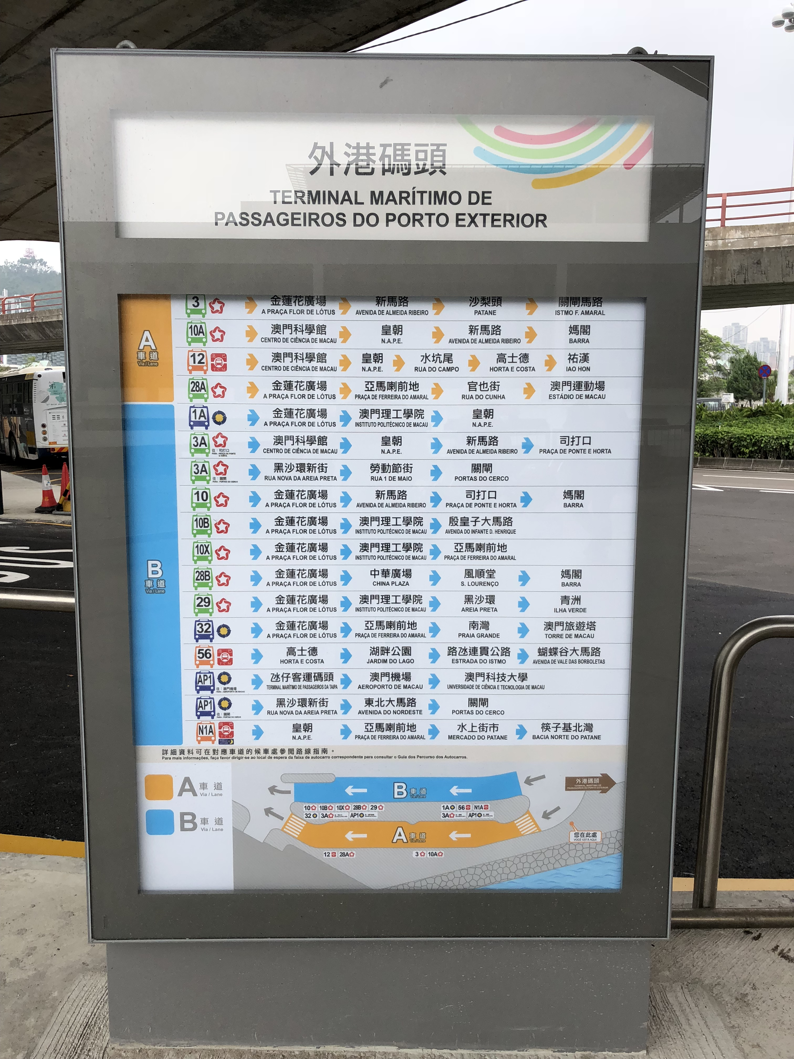 外港碼頭站的新行車指示牌.